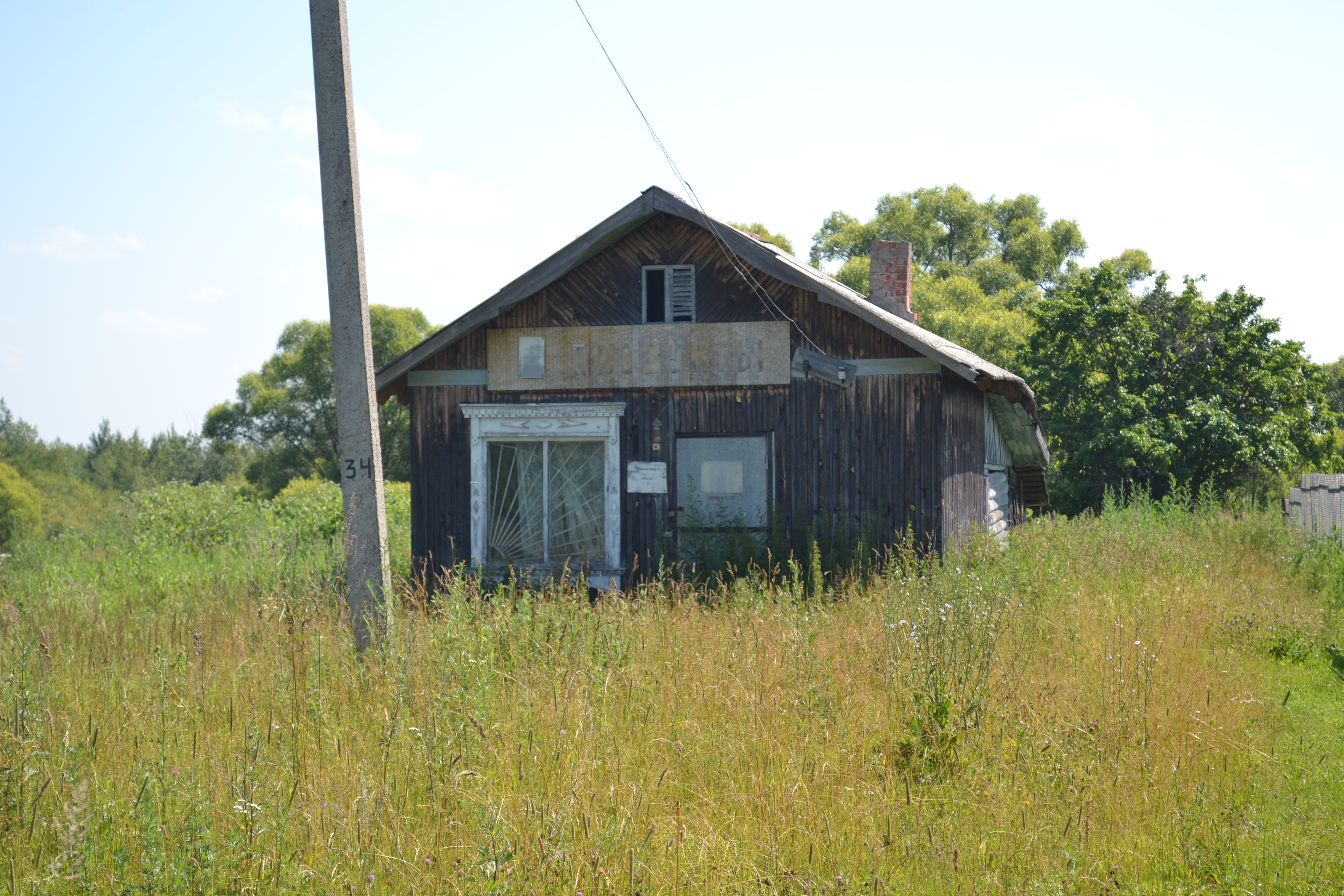 Заброшенный магазин в Старо-Черкасово (Шатурский район)